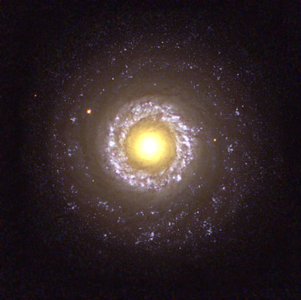 Seyfert Galaxy (NGC 7742).